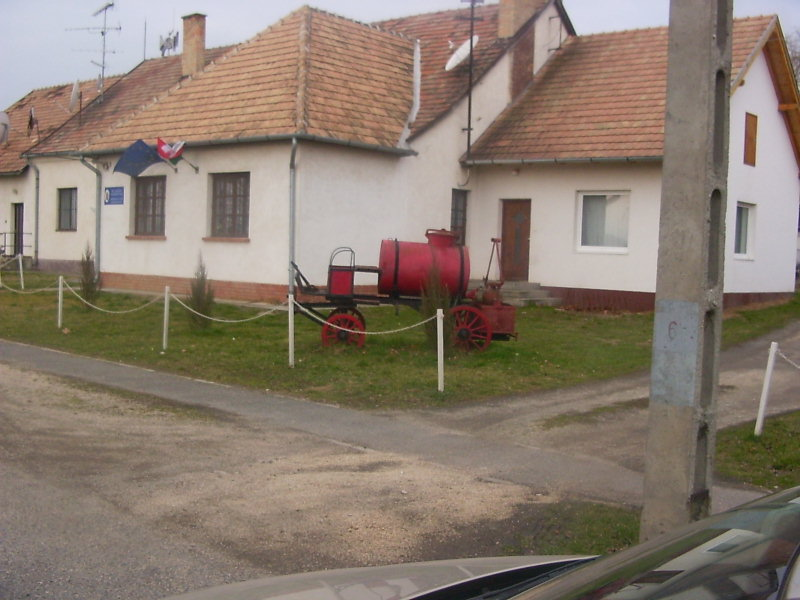 Községháza a Veszprém megyei Gic községben